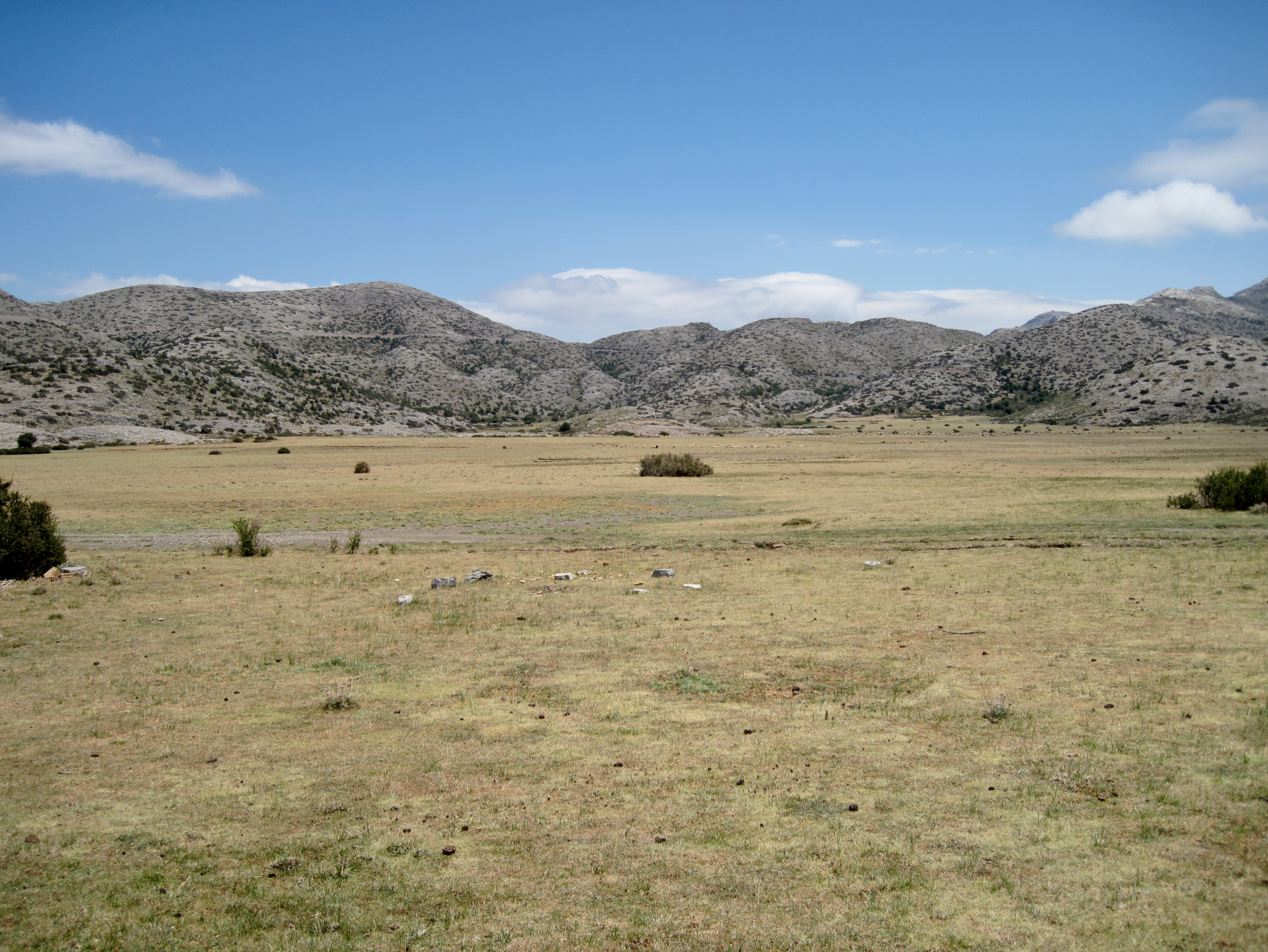 Nida-Hochebene, Gemeinde Anogia, Präfektur Rethymno, Kreta, Griechenland